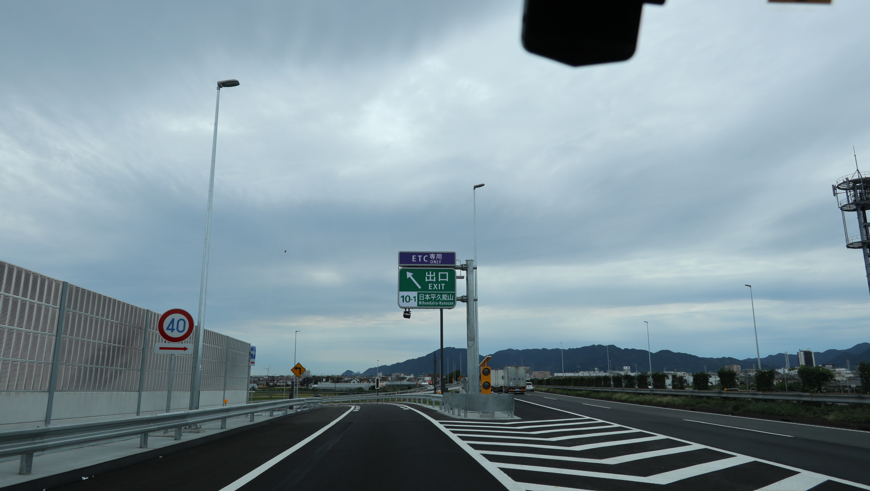 日本平久能山スマートインターチェンジ 出口